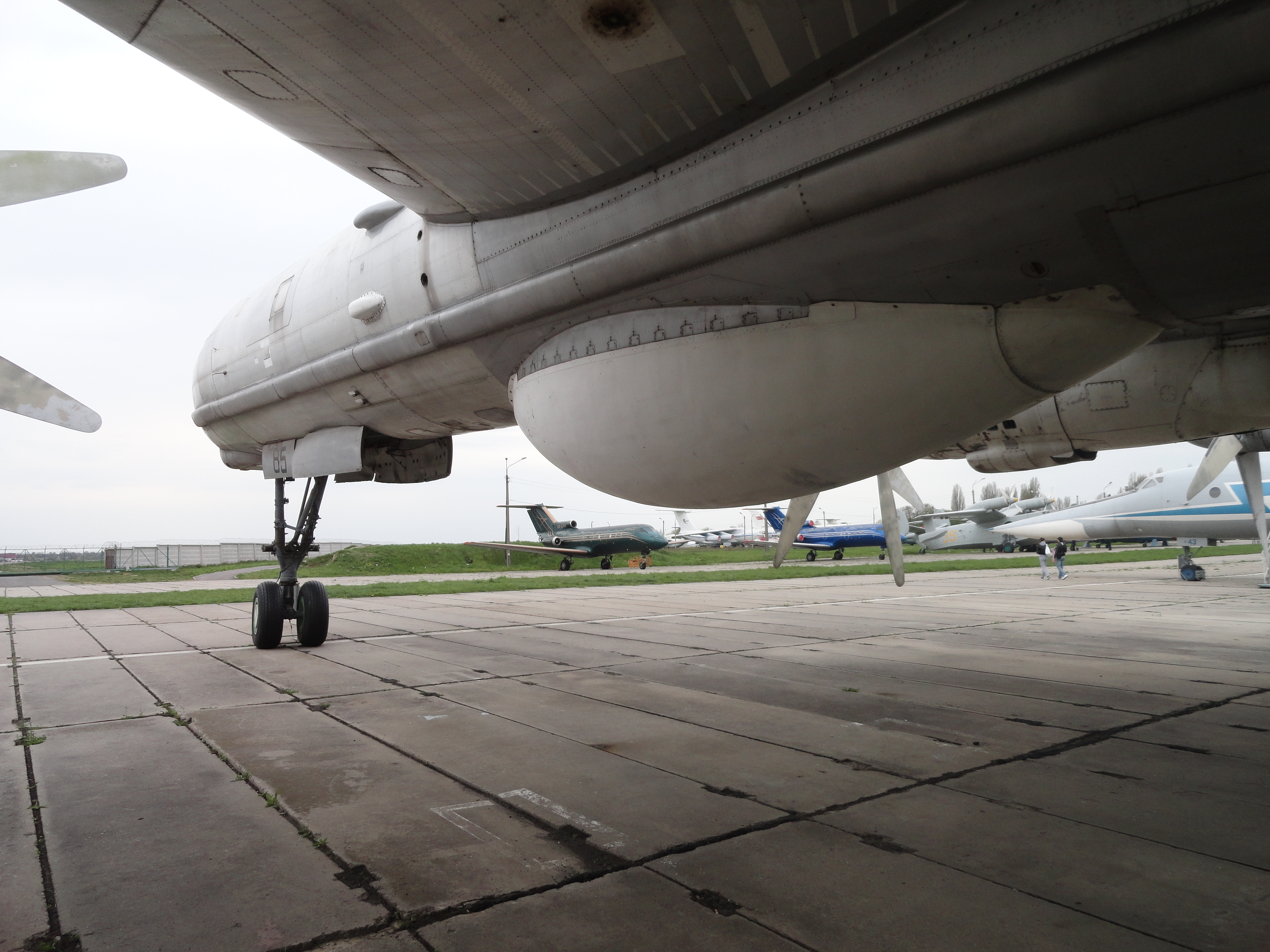 Обтекатель РЛС кругового обзора под центропланом Ту-142. Фото сделано в музее авиации в Киеве.